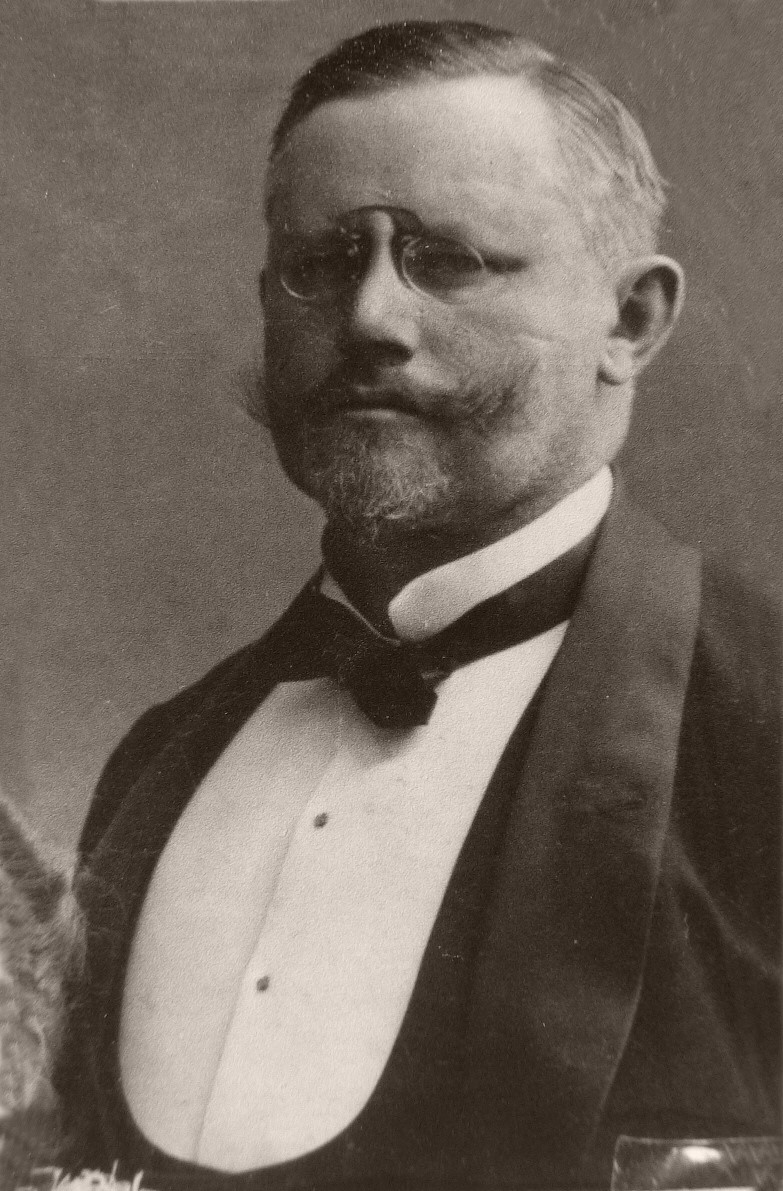 Porträtfotografie von Richard Lucke